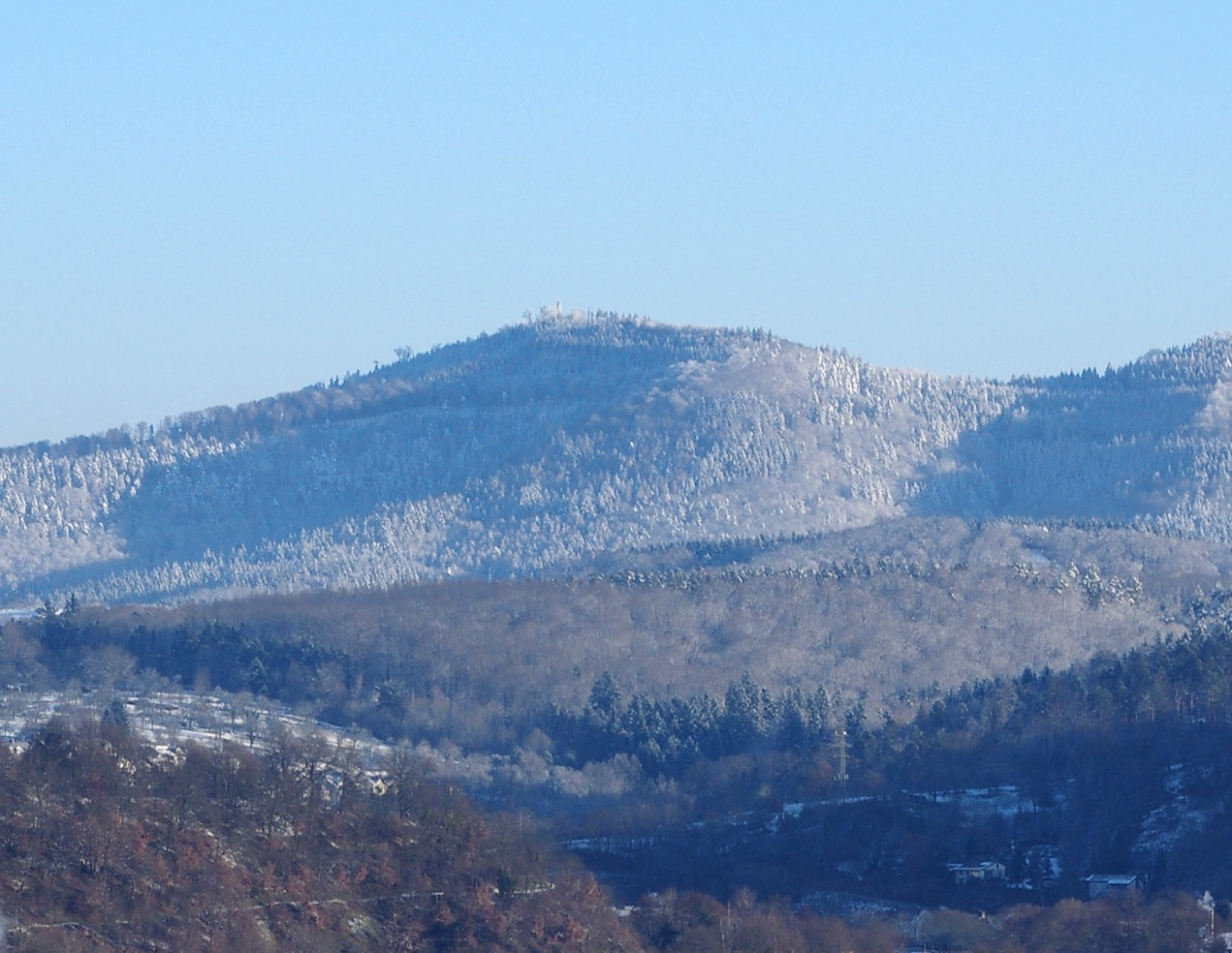 Der Mahlberg bei Gaggenau im Winter. Blick aus südsüdöstlicher Richtung von Gernsbach (Bildausschnitt).